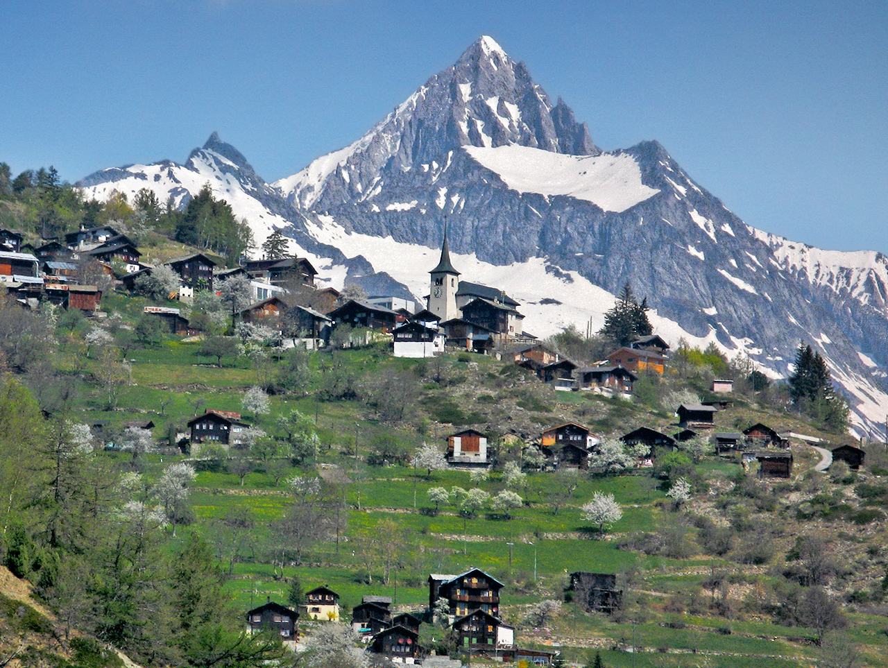 Zeneggen mit Bietschhorn (Aufnahmestandort Eschacker)